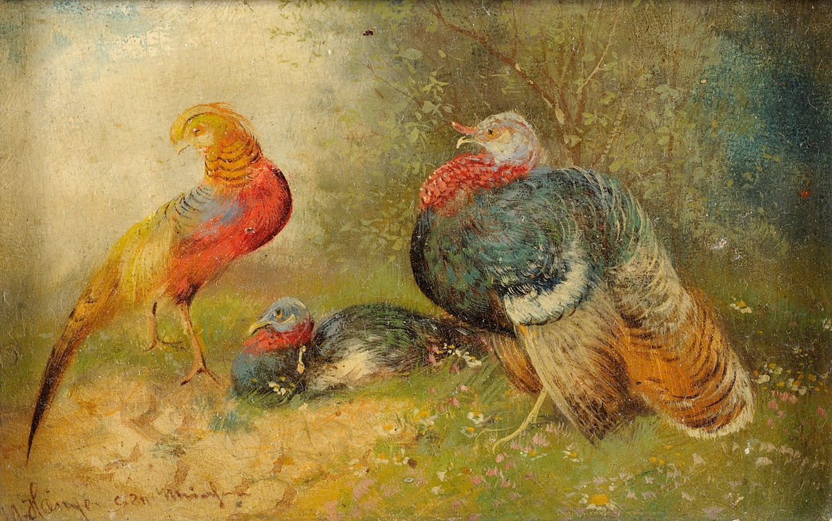 Goldfasan und Truthähne. Signiert. ÖL/Holz, 9 x 14 cm